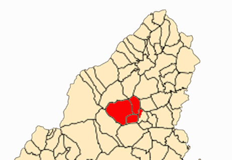 Máxima extensión de las tierras de Bustarviejo (Madrid, España). Territorio aproximado de las posesiones de Bustarviejo hasta 1577.